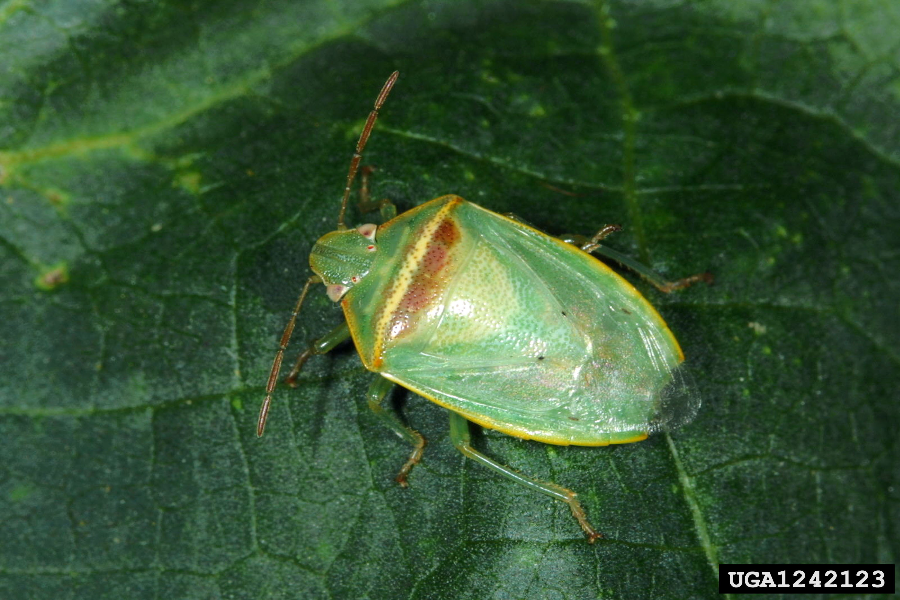 Redbanded stinkbug (Piezodorus guildinii ) (adult) ; family Pentatomidae